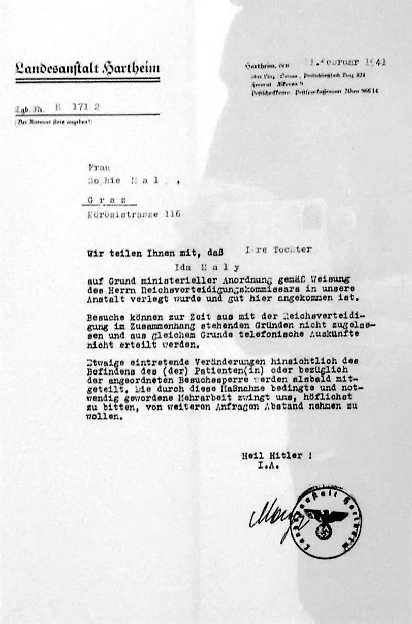 Ida Maly, Überstellungsanzeige der NS-Tötungsanstalt Hartheim